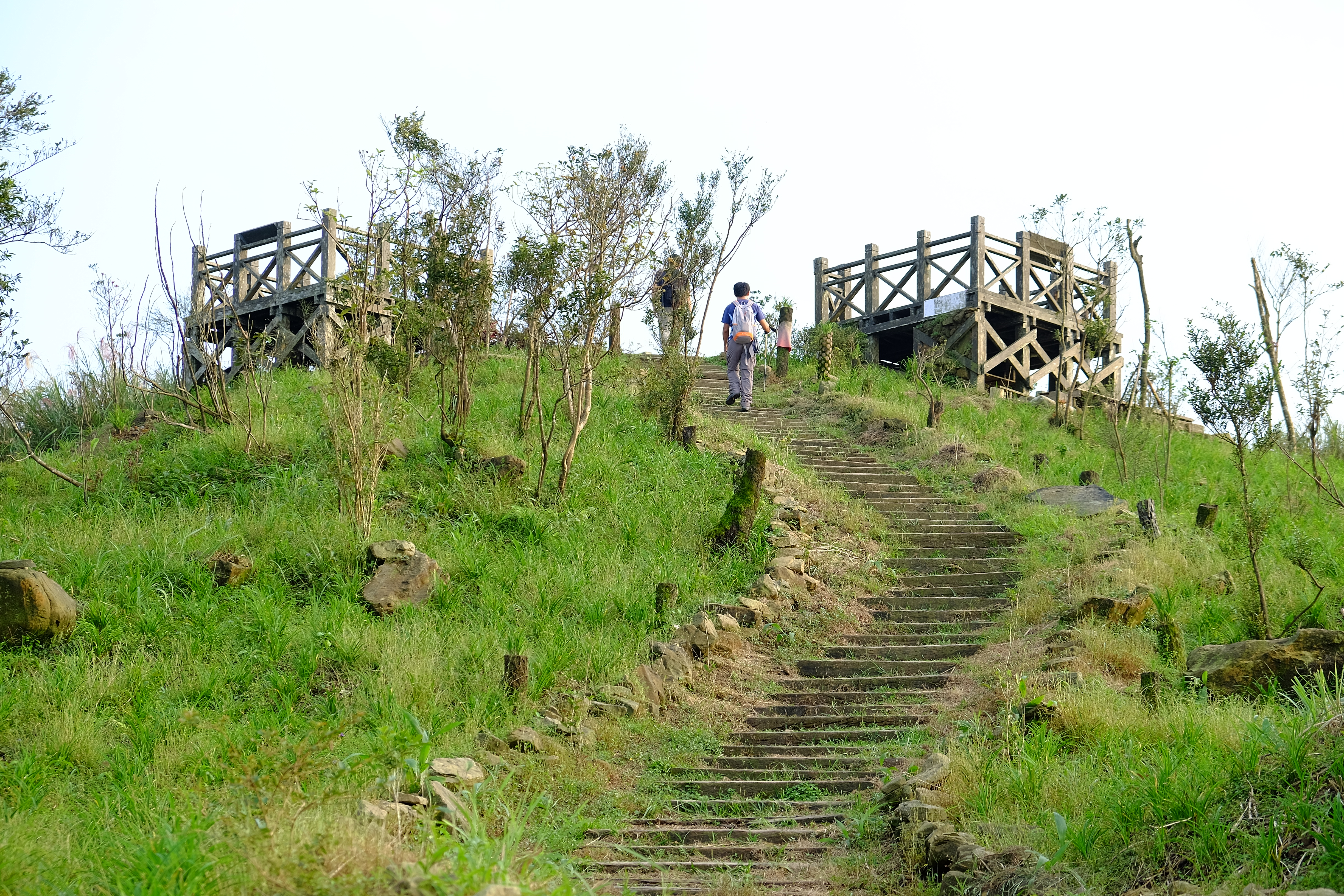 中文（台灣）: Mt JIANGZILIAO 山頂平台2016